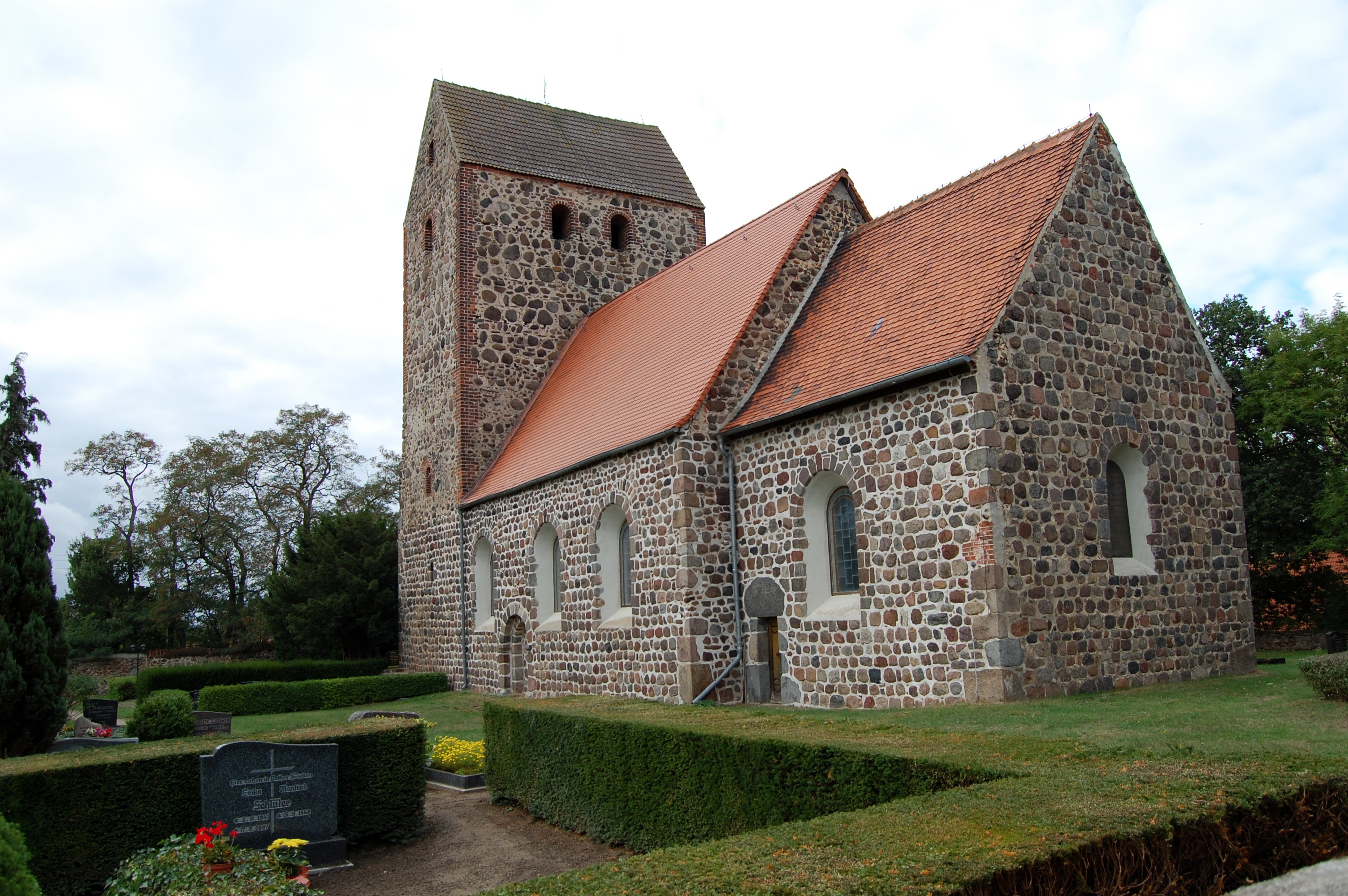 Steinfeld, Gemeinde Bismark (Altmark), Dorfkirche